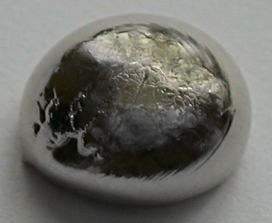 La bildo estas kopiita de de. La originala priskribo estas: * Bildbeschreibung: Palladium, 2,7g, 99,99% rein * Quelle: Foto aus meiner Elementesammlung * Fotograf: Tomihahndorf * Datum: März 2006